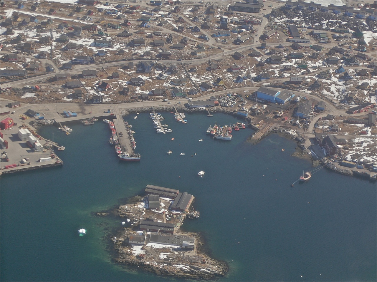 Aasiat